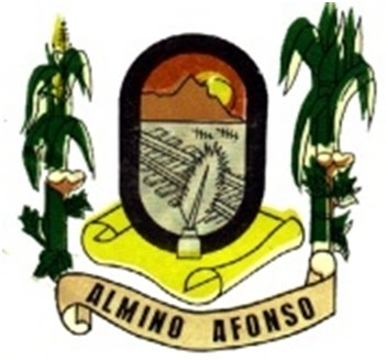 Brasão do município de Almino Afonso (Rio Grande do Norte)